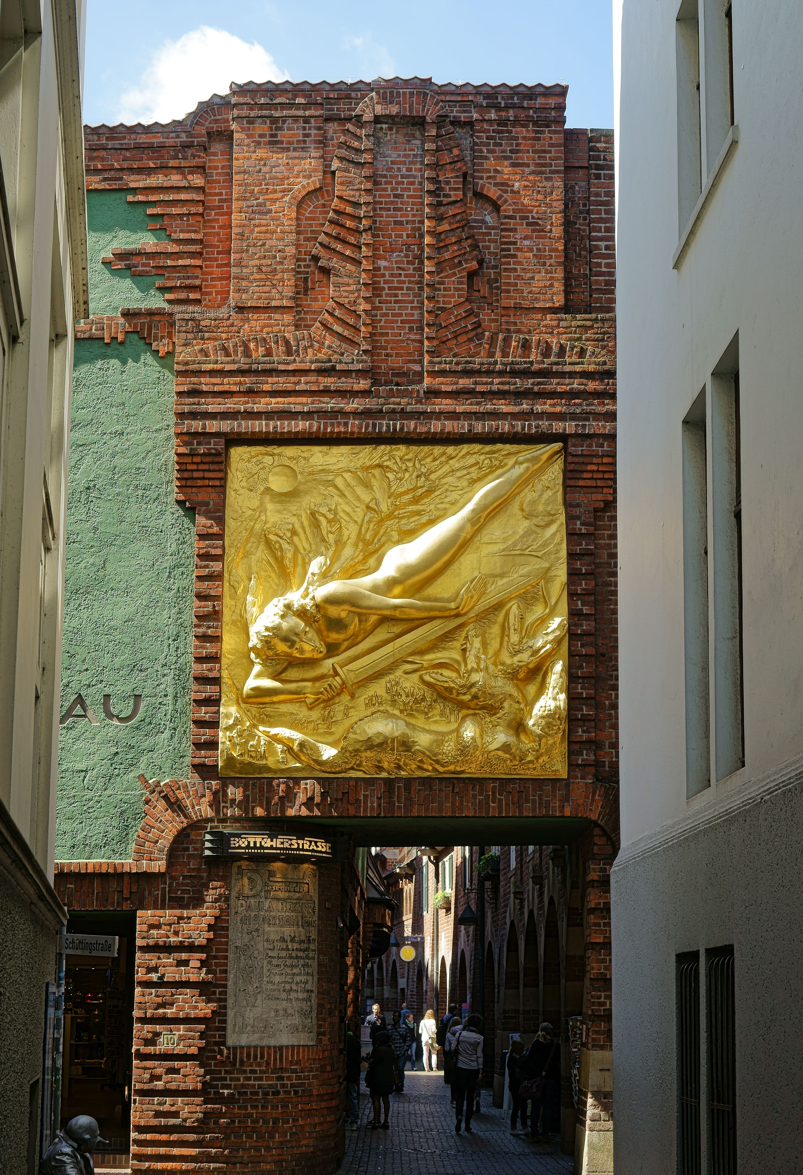 Böttcherstraße in Bremen, Böttcherstraße mit Lichtbringer aus Richtung MarktplatzDie Gesamtanlage ist ein geschütztes Kulturdenkmal in der Freien Hansestadt Bremen, mit der Nr. 0209,T beim Landesamt für Denkmalpflege registriert.